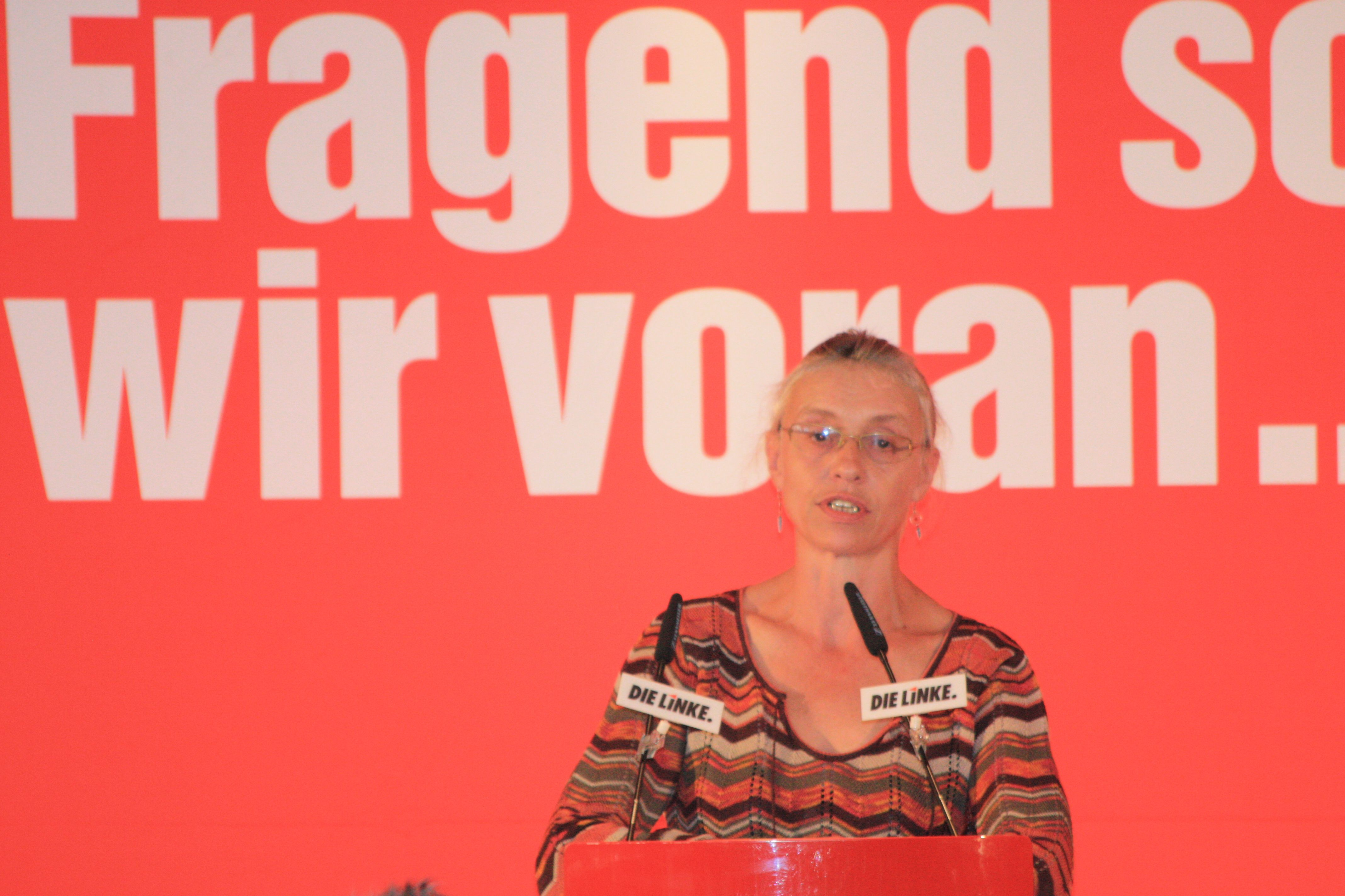 Rede von Elke Altmann, Kreisverband Bautzen